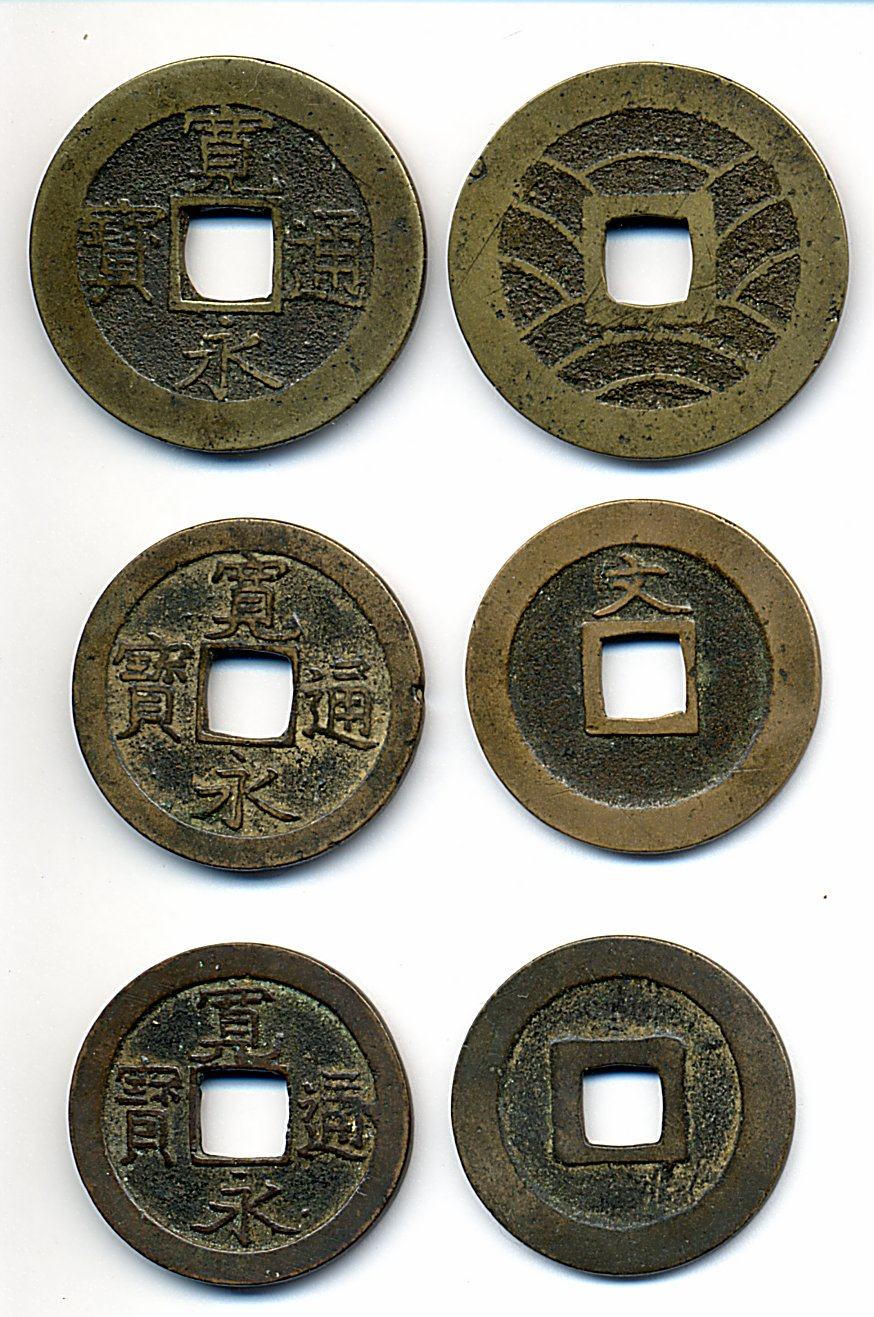 Kaneitsuho